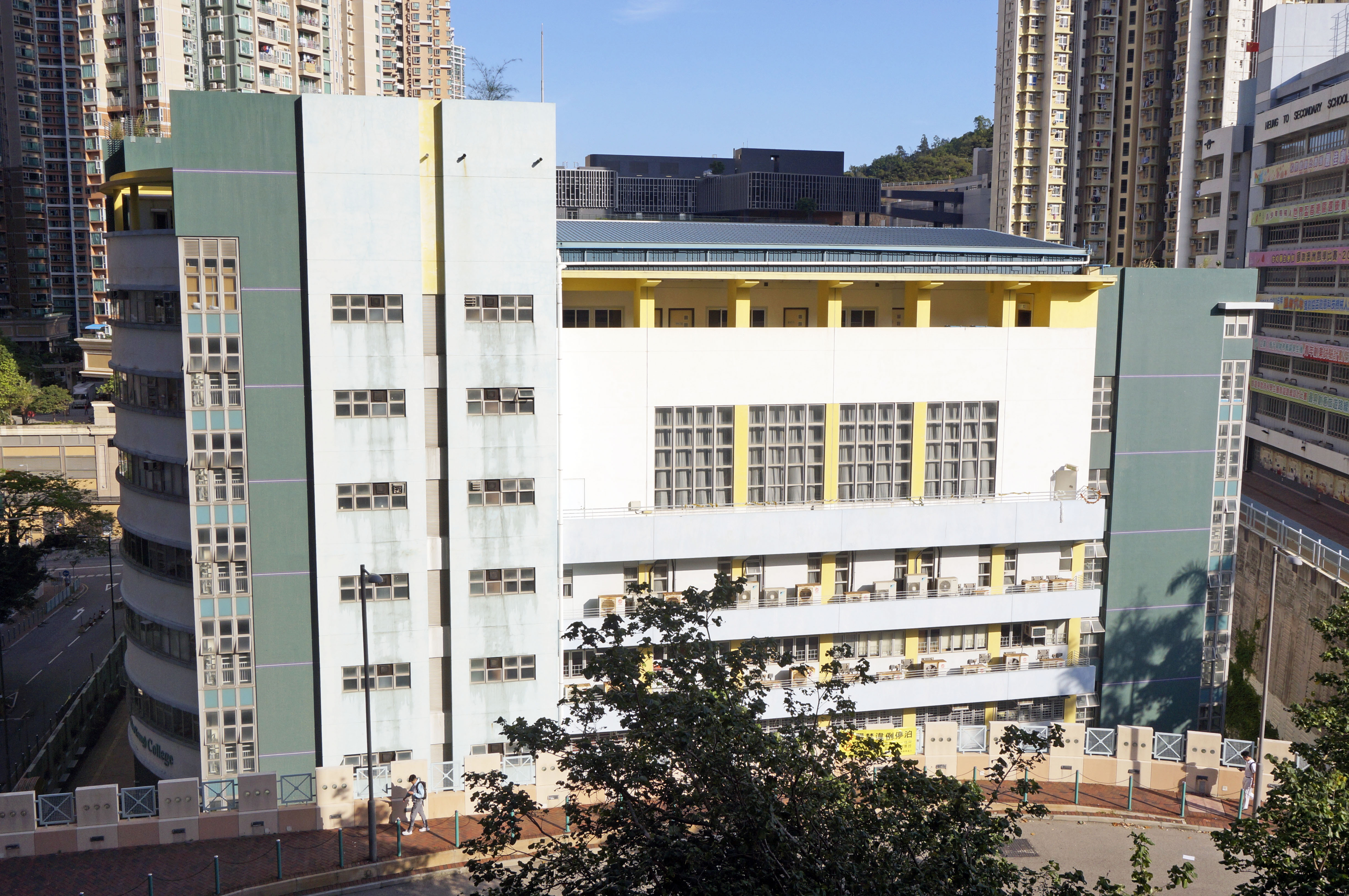 優才（楊殷有娣）書院調景嶺校舍的外貌